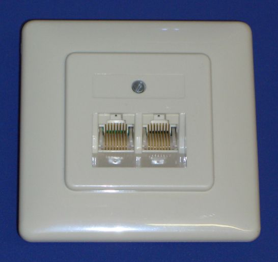 UAE mit 2 Buchsen, Unterputz-Ausführung